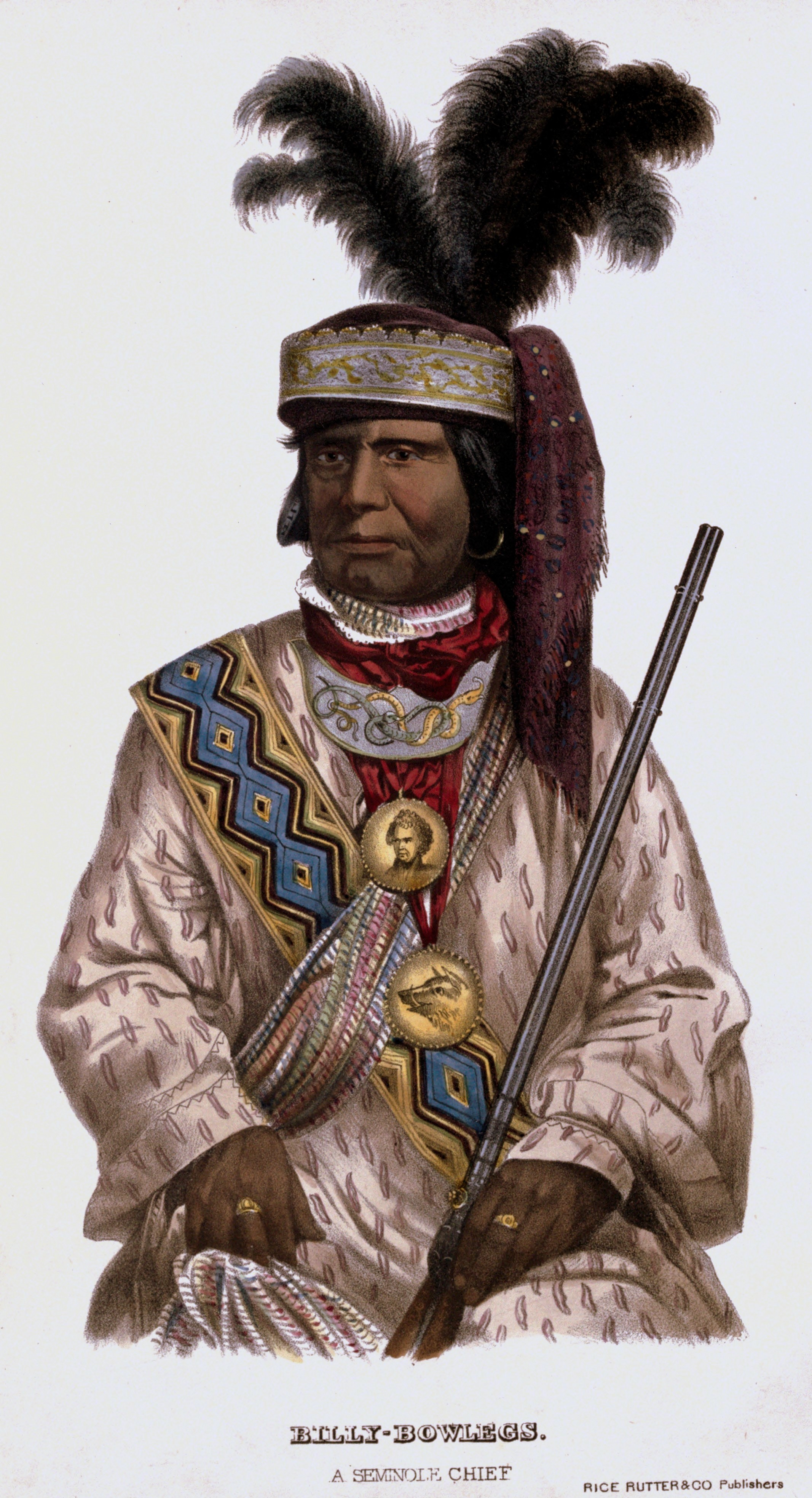 Frontispiece for